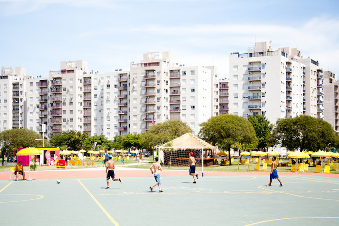 La playa del Sur de la Ciudad, ubicada en el Parque Indoamericano. Detrás se vé el Complejo Habitacional Barrio Parque Avellaneda, terminado en 2009.